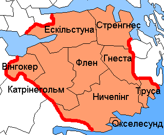 Карта адміністративного поділу лену Седерманланд у Швеції. Карту створено на основі карти File:Södermanland County.png.